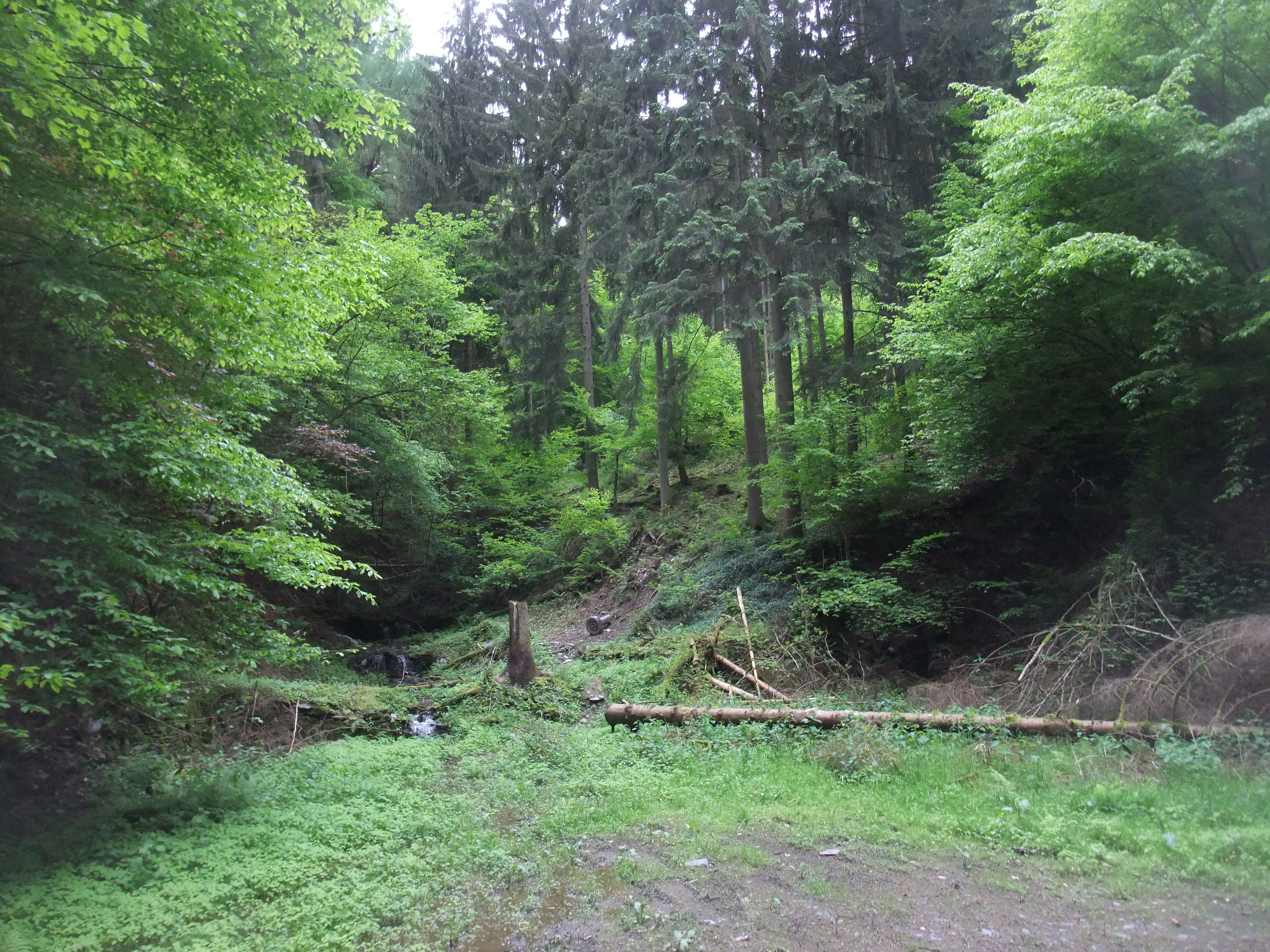 Gelaende an der Grube vom Niff Fell 2013